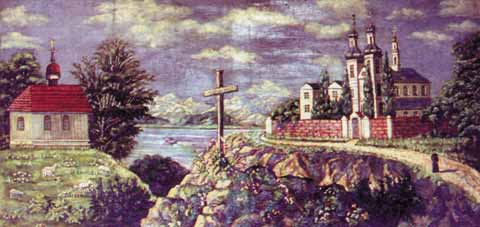 Беларуская (тарашкевіца): Юравічы (Juravičy). Касьцёл Адведзінаў Найсьвяцейшай Панны Марыі і калегіюм езуітаў